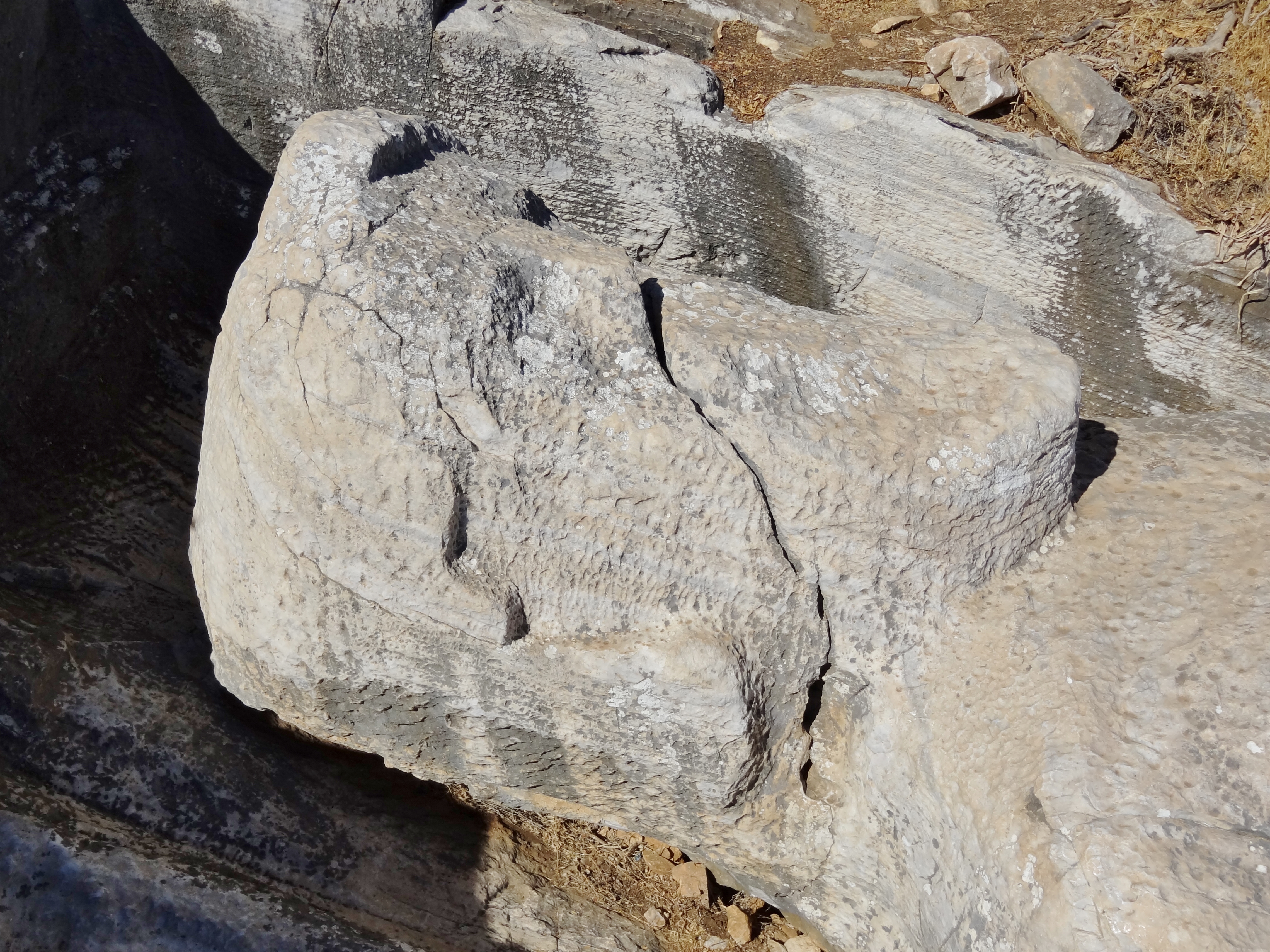 Kopf des Kouros (Statue des Dionysos) oberhalb von Apollonas im Nordosten von Naxos, Kykladen, Griechenland